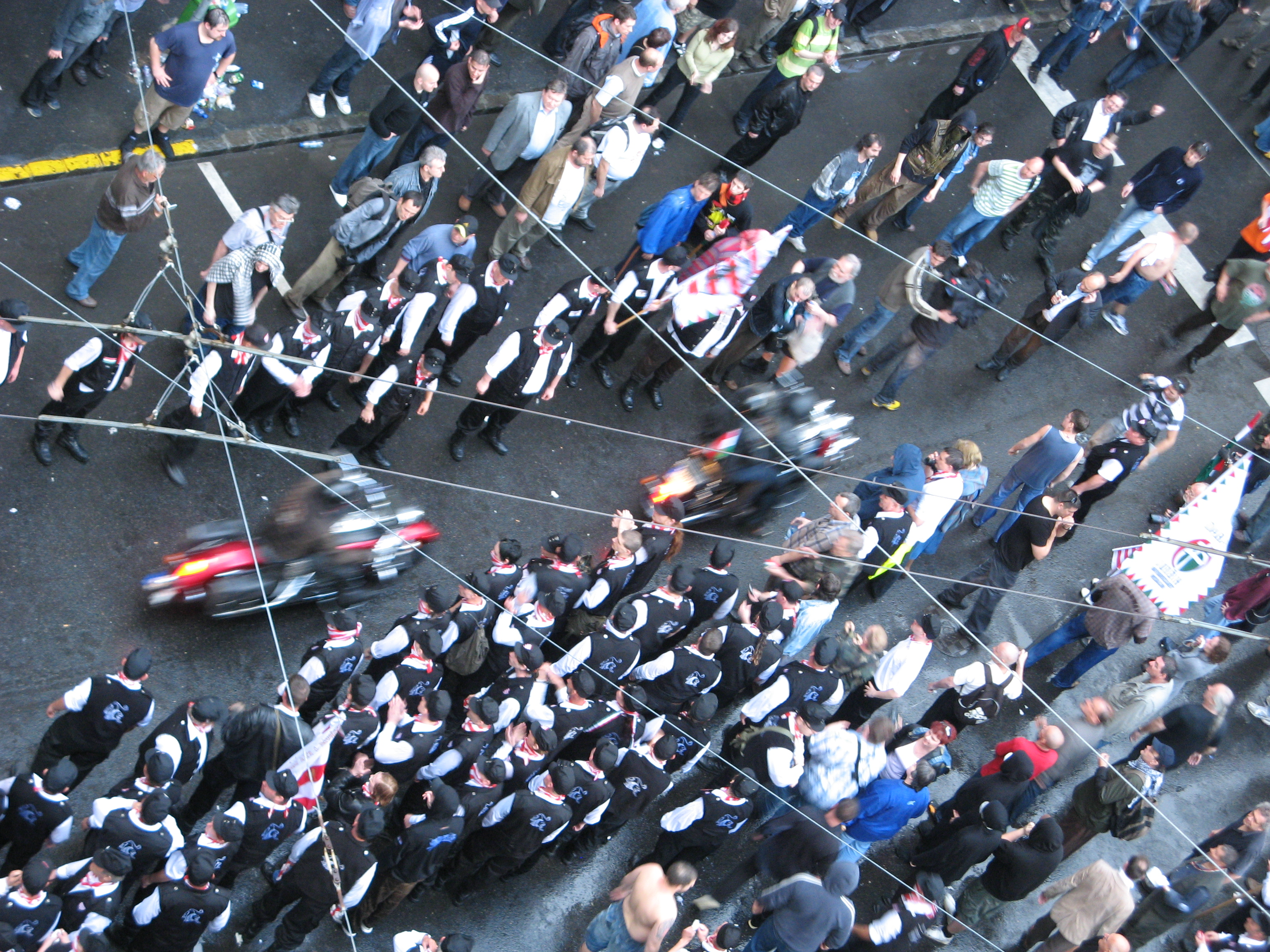 Mitglieder der Magyar Gárda (unten links) in der typischen Uniform.